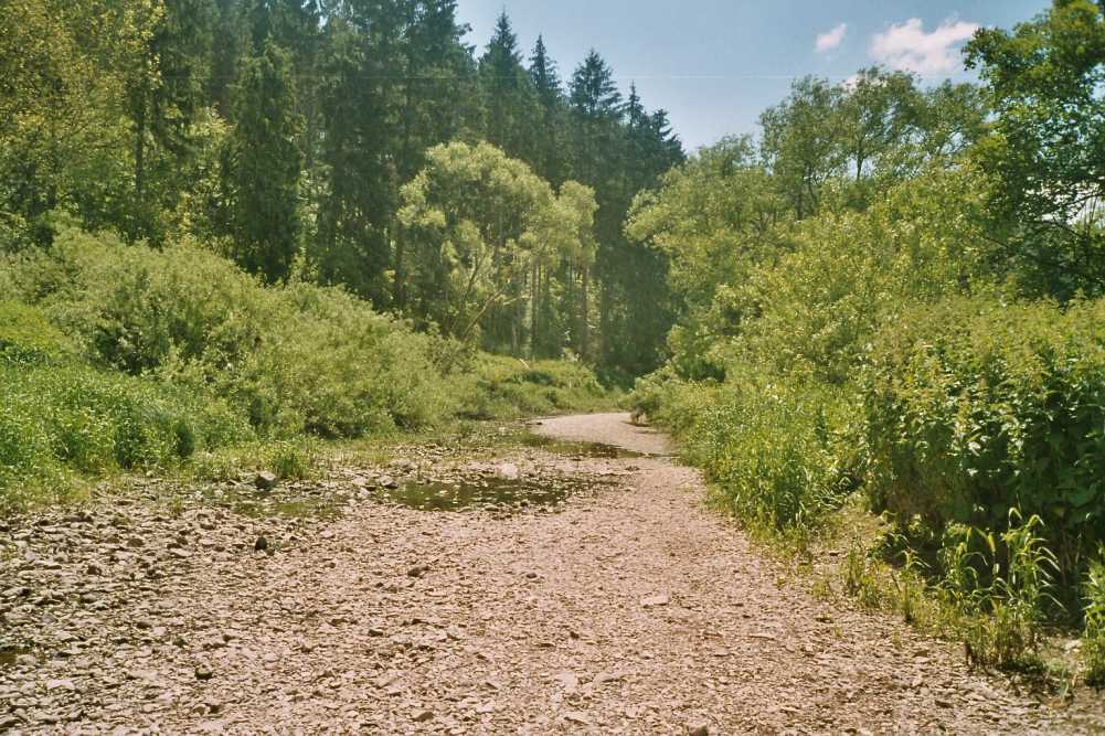 Die Versickerung der oberen Donau bei Immendingen